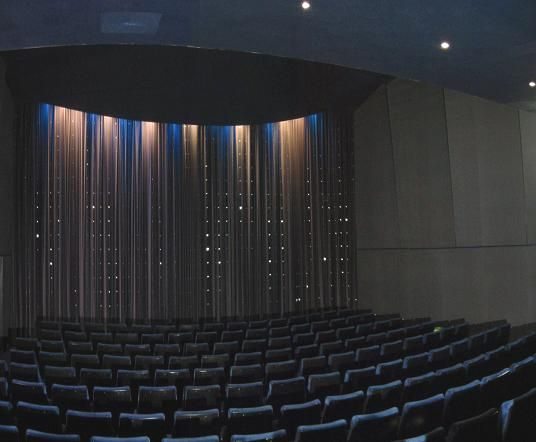 Gabriel Filmtheater München - Kino 1 (2011)